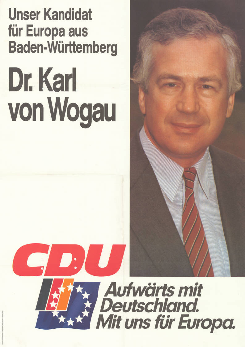 Unser Kandidat für Europa aus Baden-Württemberg Dr. Karl von Wogau CDU Aufwärts mit Deutschland. Mit uns für Europa.Abbildung:PorträtfotoPlakatart:Kandidaten-/Personenplakat mit PorträtAuftraggeber:CDU-Bundesgeschäftsstelle, Abt. Öffentlichkeitsarbeit, BonnDrucker_Druckart_Druckort:Willy F.P. Fehling GmbH, HannoverObjekt-Signatur:10-030 : 183Bestand:Europawahlplakate (10-030)GliederungBestand10-18:Europawahlplakate (10-030) » Europawahl am 17.6.1984 » CDULizenz:KAS/ACDP 10-030 : 183 CC-BY-SA 3.0 DE